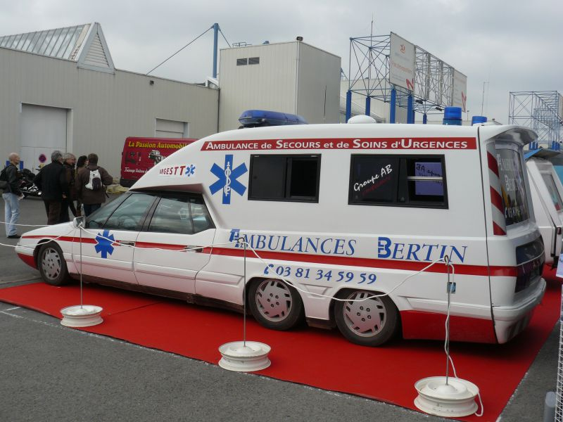 Français cadien: Reims 2012